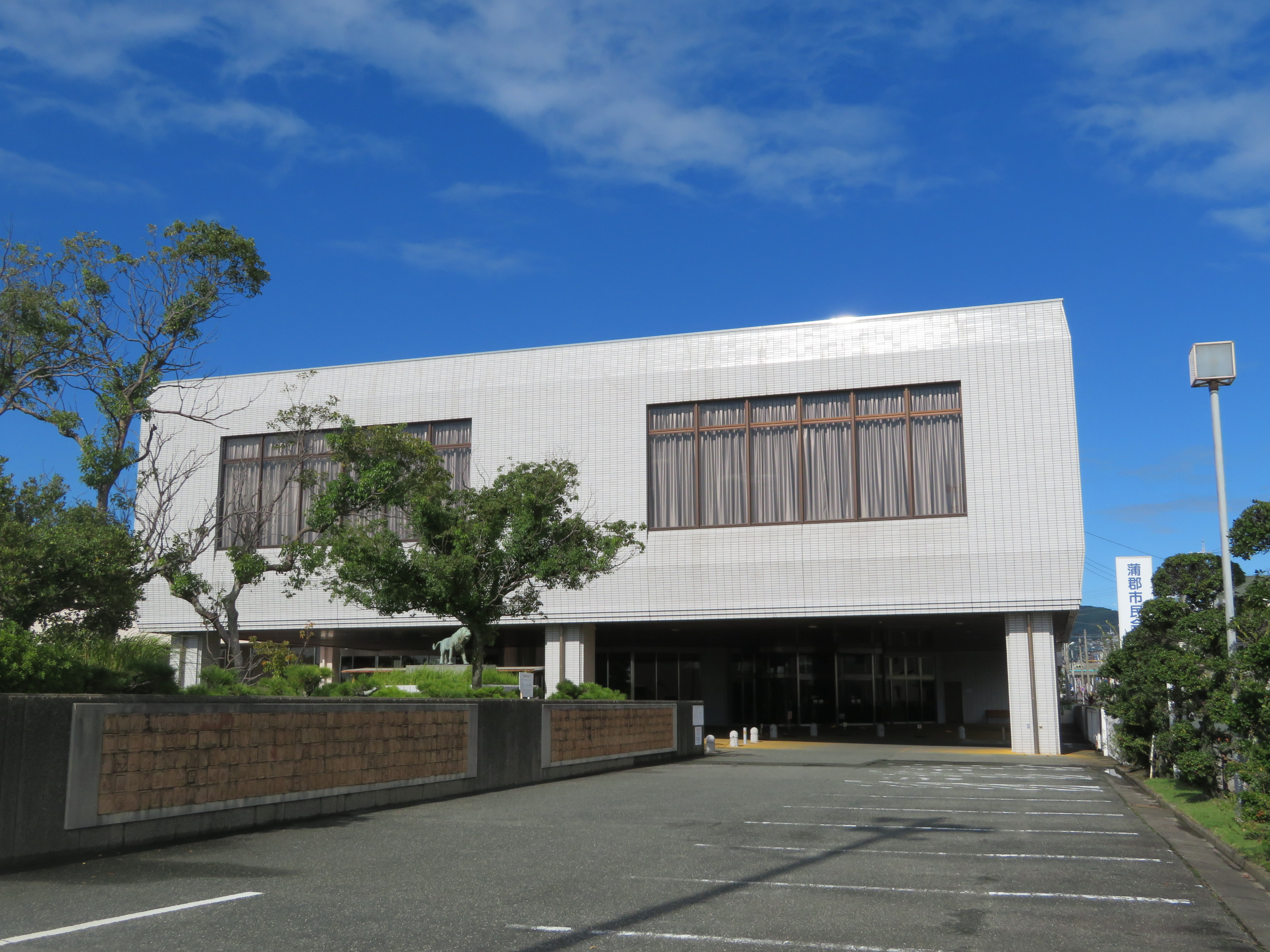 蒲郡市民会館（蒲郡市栄町）